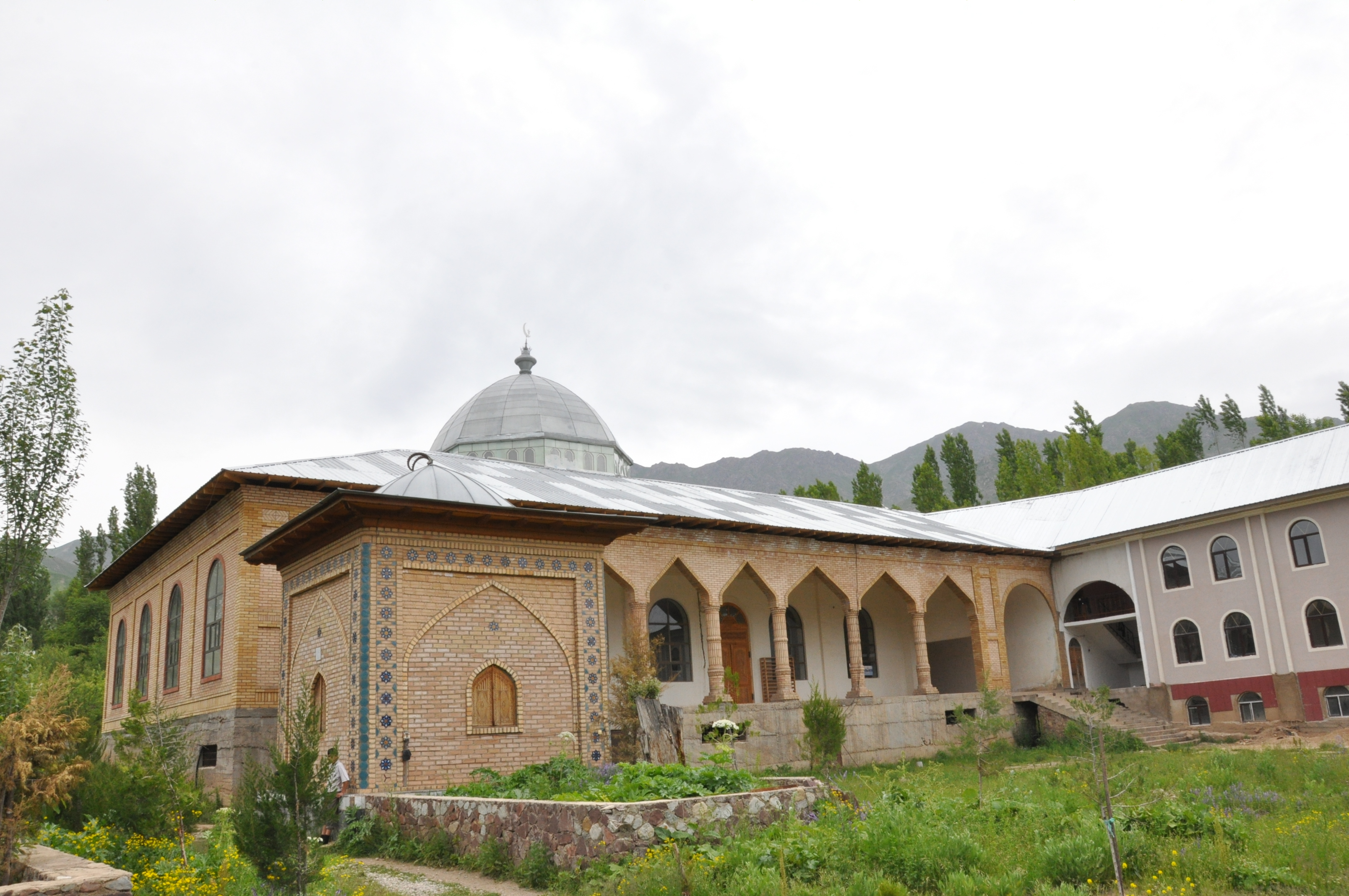 Масҷид д. Элок н. Файзобод (2)